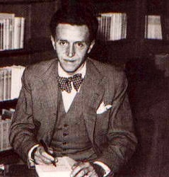 L'écrivain collaborationniste Lucien Rebatet lors d'une séance publique de signatures en librairie.